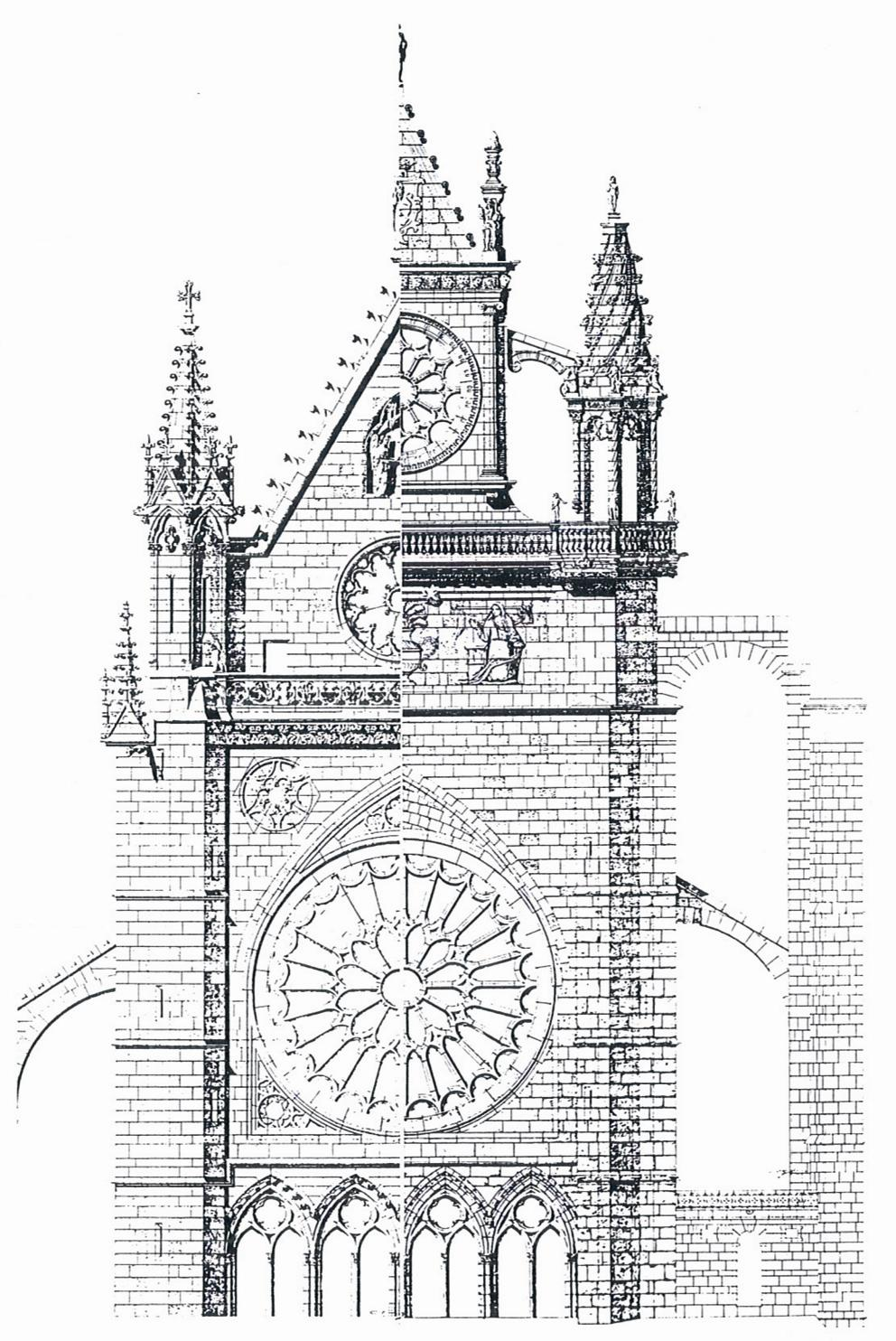 modificacion de la fachada principal, de la antigua a la actual